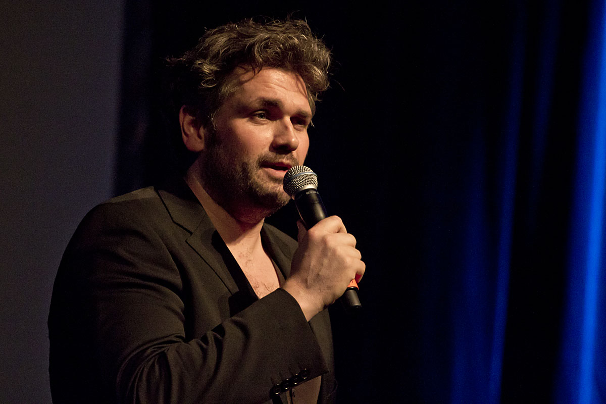 Tenoren Peter Lodahl ved arrangementet Zetland Live #4 på Teater Bremen den 21. februar 2013